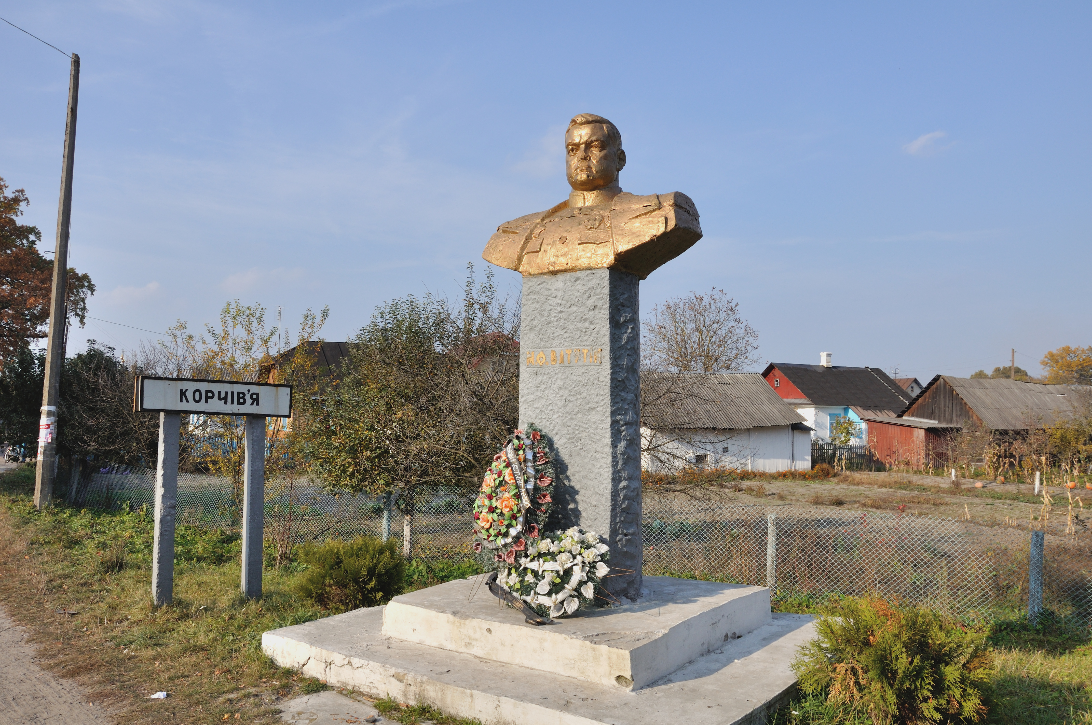 Пам'ятник генералу армії, Герою Радянського Союзу Ватутіну М. Ф., с. Корчів'я